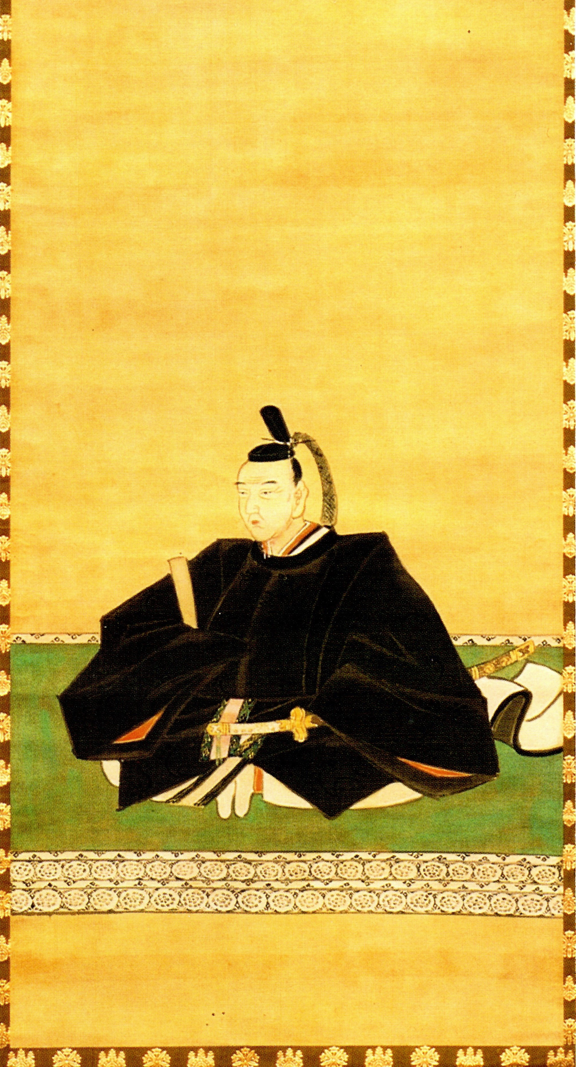 有馬頼貴の肖像。